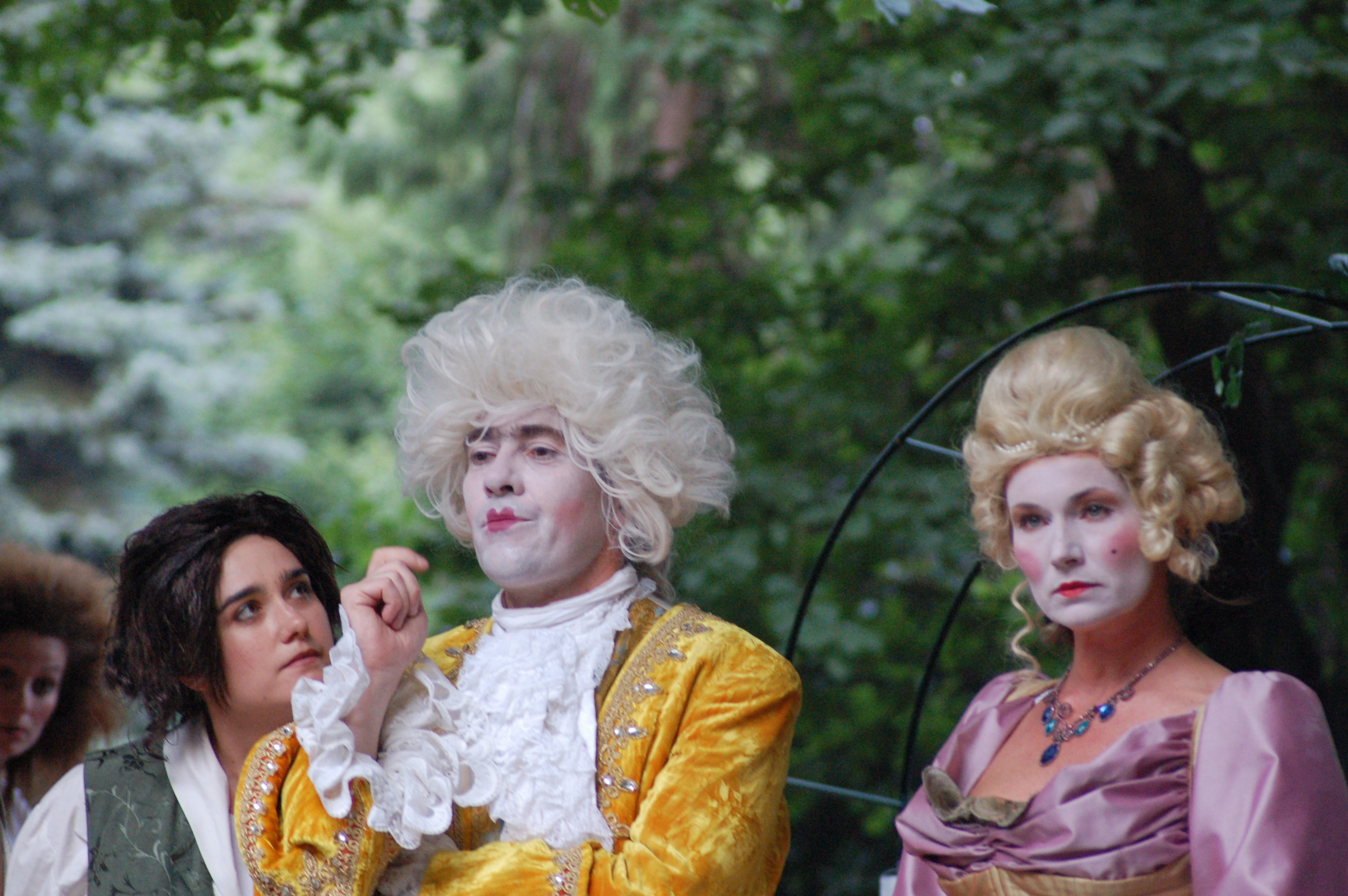 Representación de Las Bodas de Fígaro